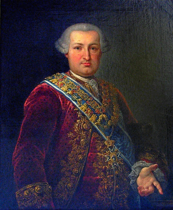 Portrait of Pedro de Alcántara Alonso Pérez de Guzmán, 14th Duke of Medina Sidonia (1724-1779)